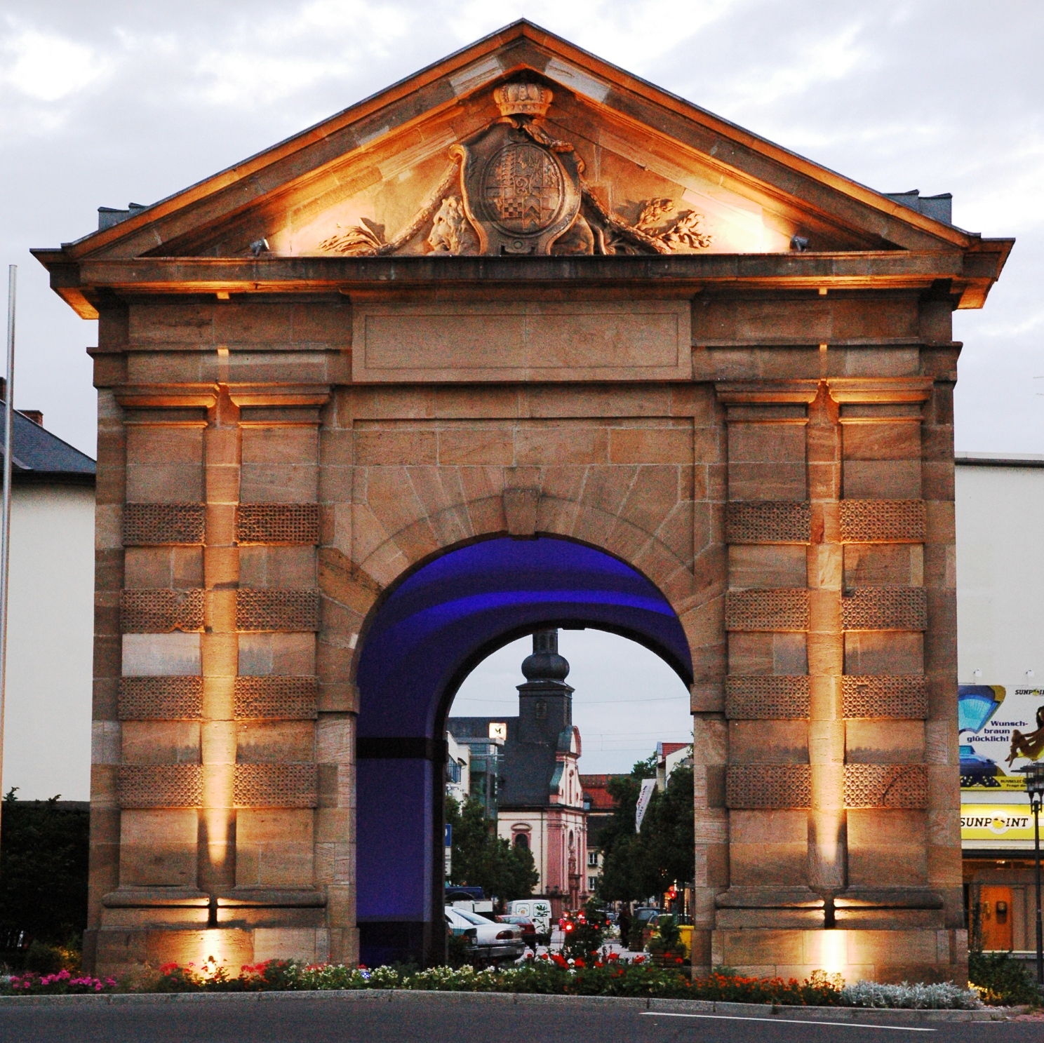 Das Wormser Tor in Frankenthal (Pfalz)